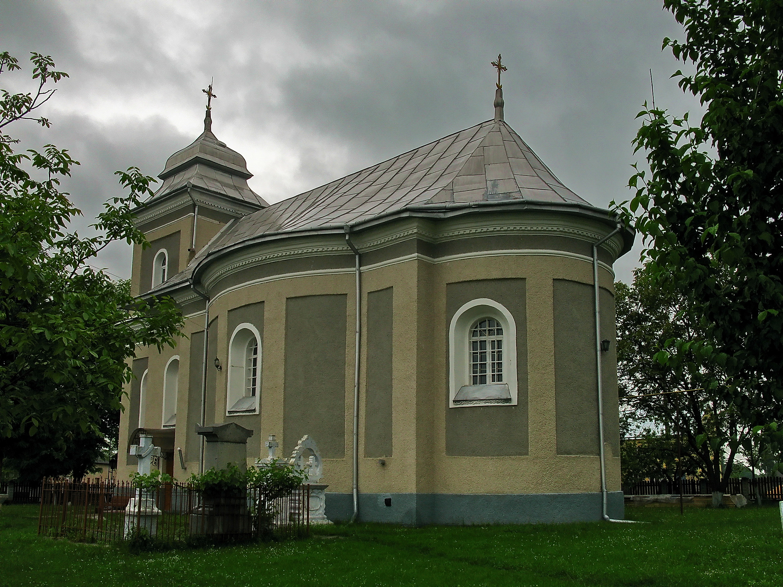 Церква Рiздва (мур.), Шипинцi